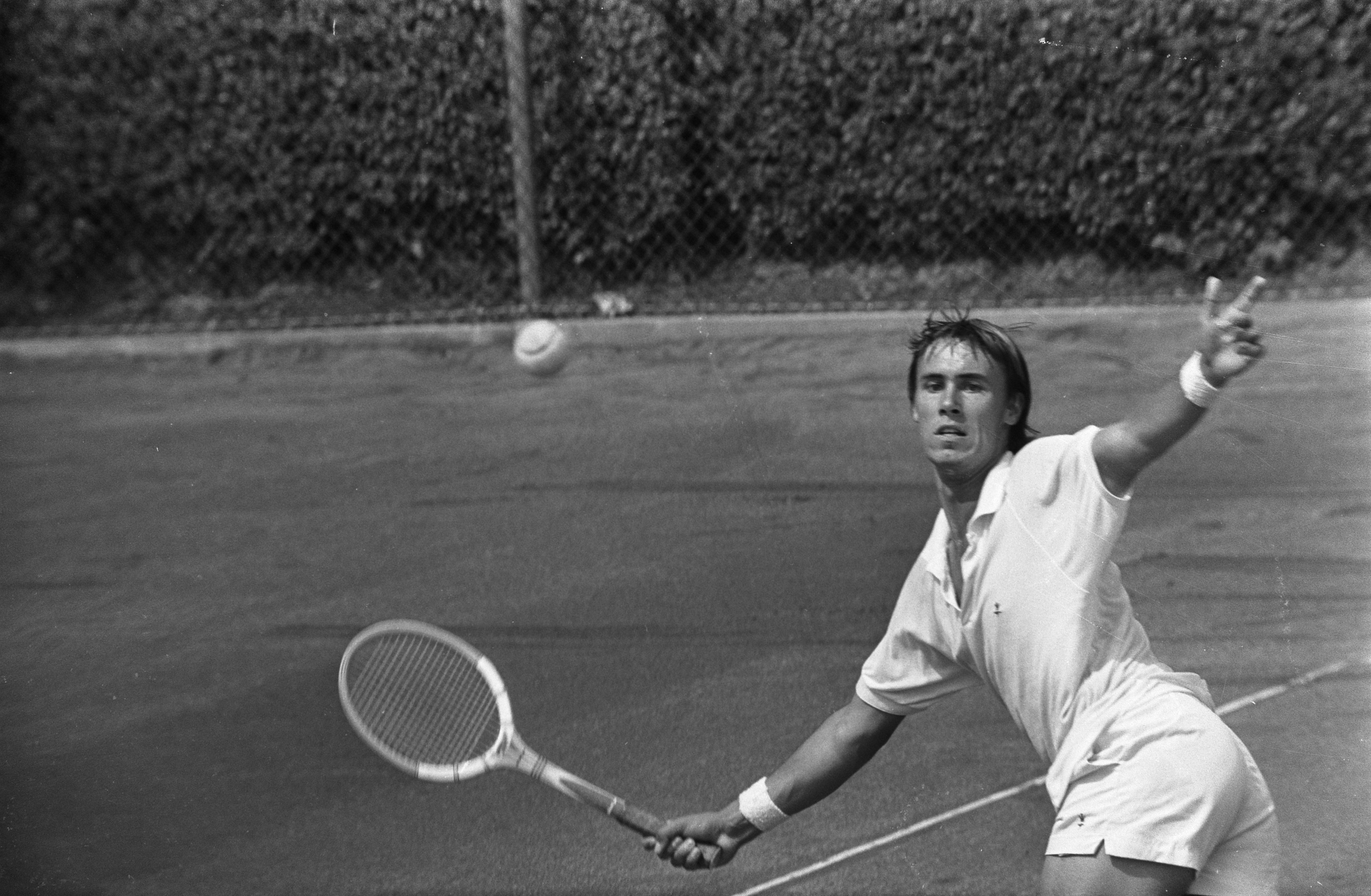 Collectie / Archief : Fotocollectie Anefo Reportage / Serie : [ onbekend ] Beschrijving : Internationale tenniskampioenschappen te Hilversum ( t Melkhuisje ); J. Alexander (Australie) in aktie Datum : 29 juli 1970 Locatie : Hilversum Trefwoorden : tennis Persoonsnaam : J. Alexander Fotograaf : Koch, Eric / Anefo Auteursrechthebbende : Nationaal Archief Materiaalsoort : Negatief (zwart/wit) Nummer archiefinventaris : bekijk toegang 2.24.01.05 Bestanddeelnummer : 923-7100